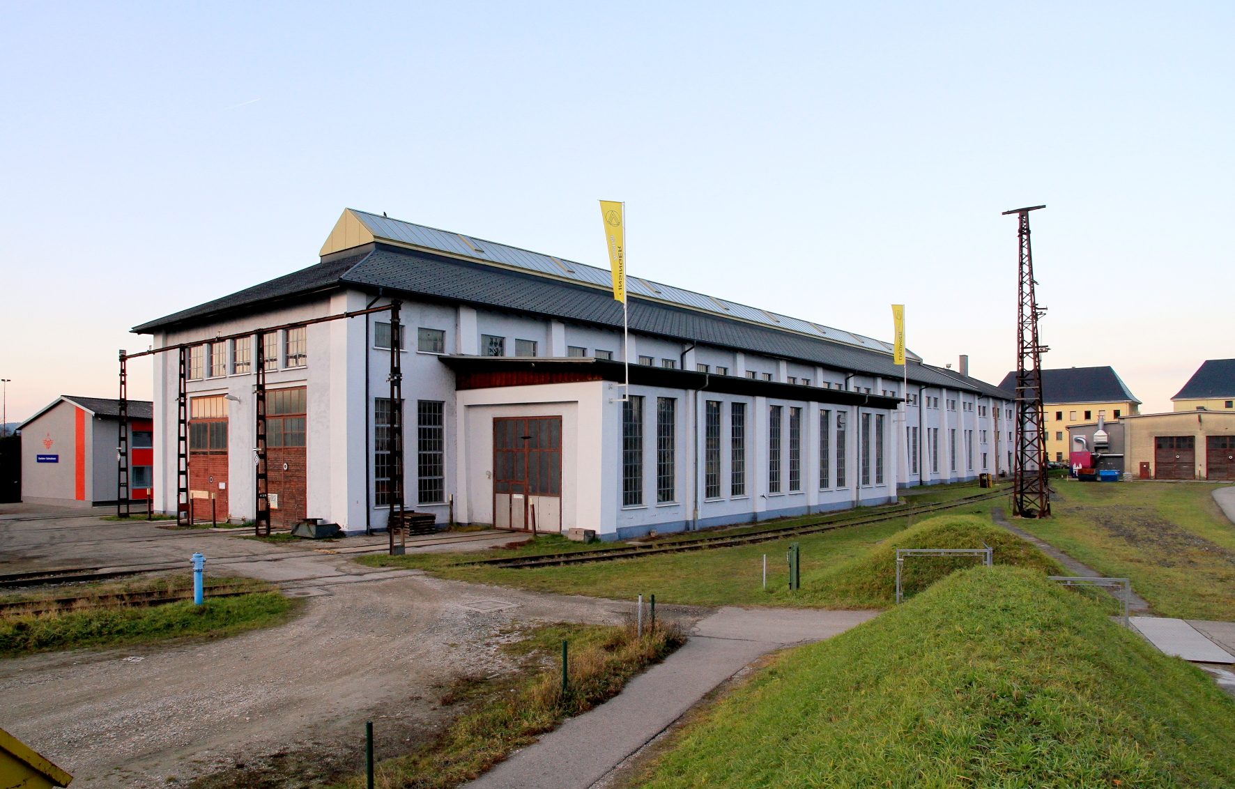 Der denkmalgeschützte Lokschuppen in der oberösterreichischen Gemeinde Attnang-Puchheim.